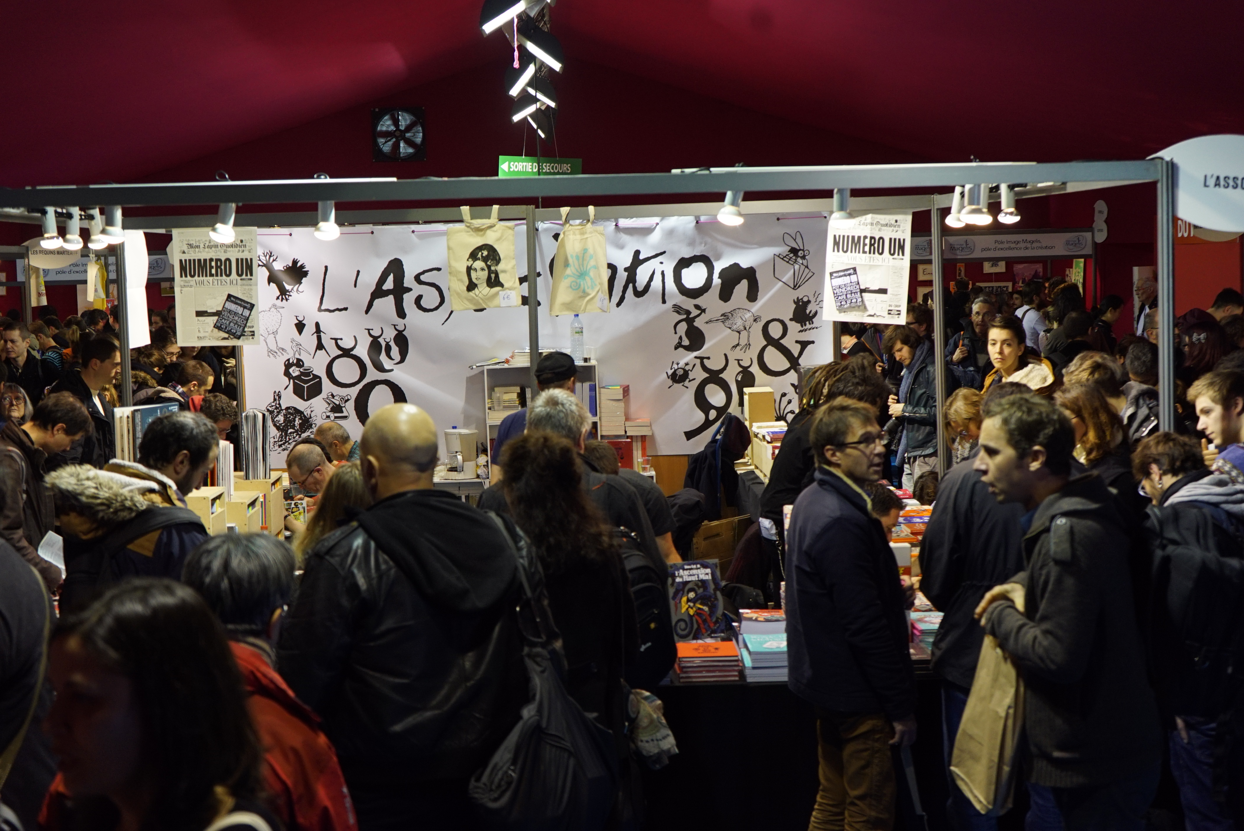 lors du 44e festival international de la Bande Dessinée, hall New York.